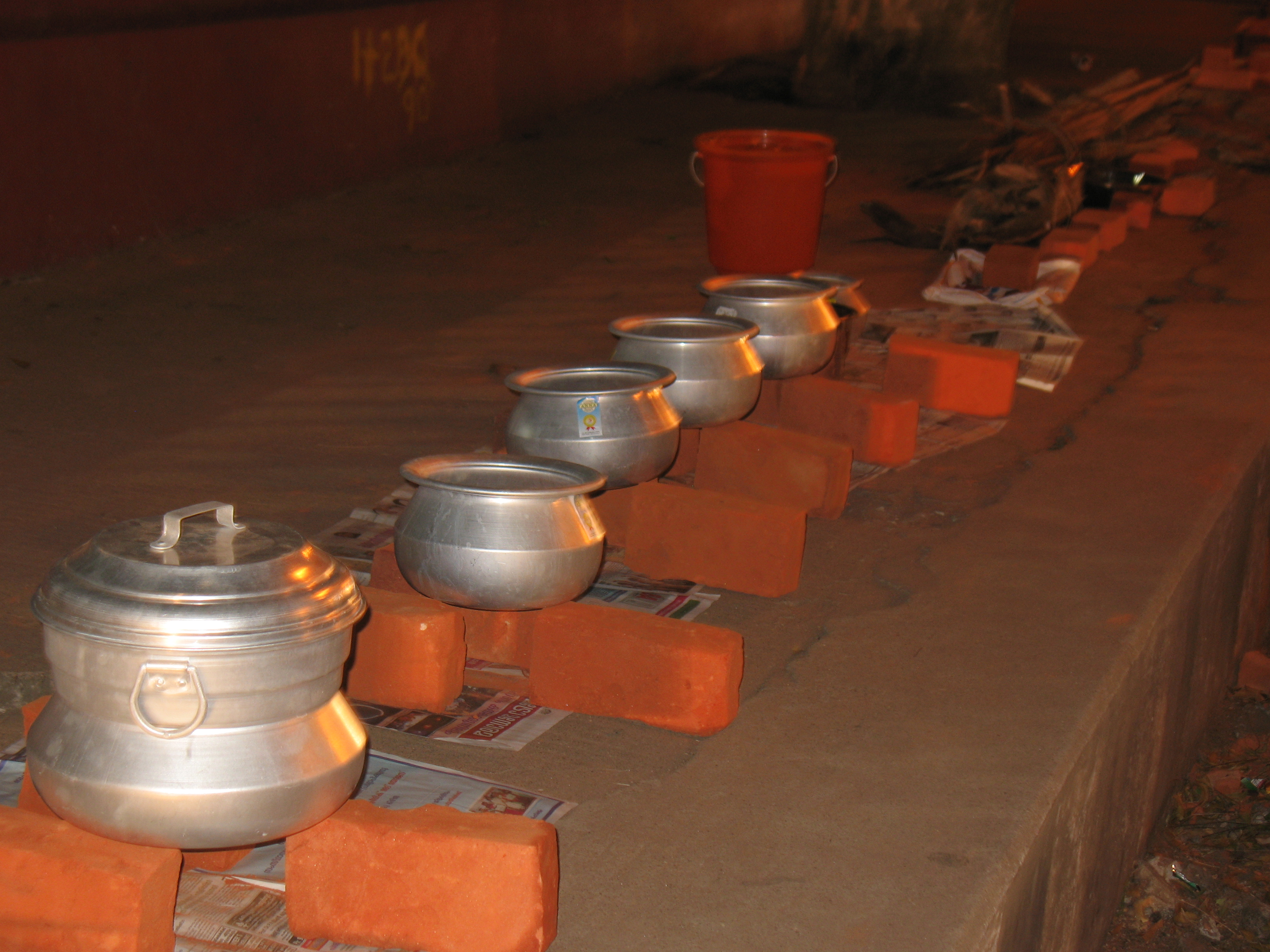 പൊങ്കാലയ്ക്കായി രാത്രി തന്നെ കലങ്ങൾ അടുപ്പിൽ വച്ചിരിക്കുന്നു